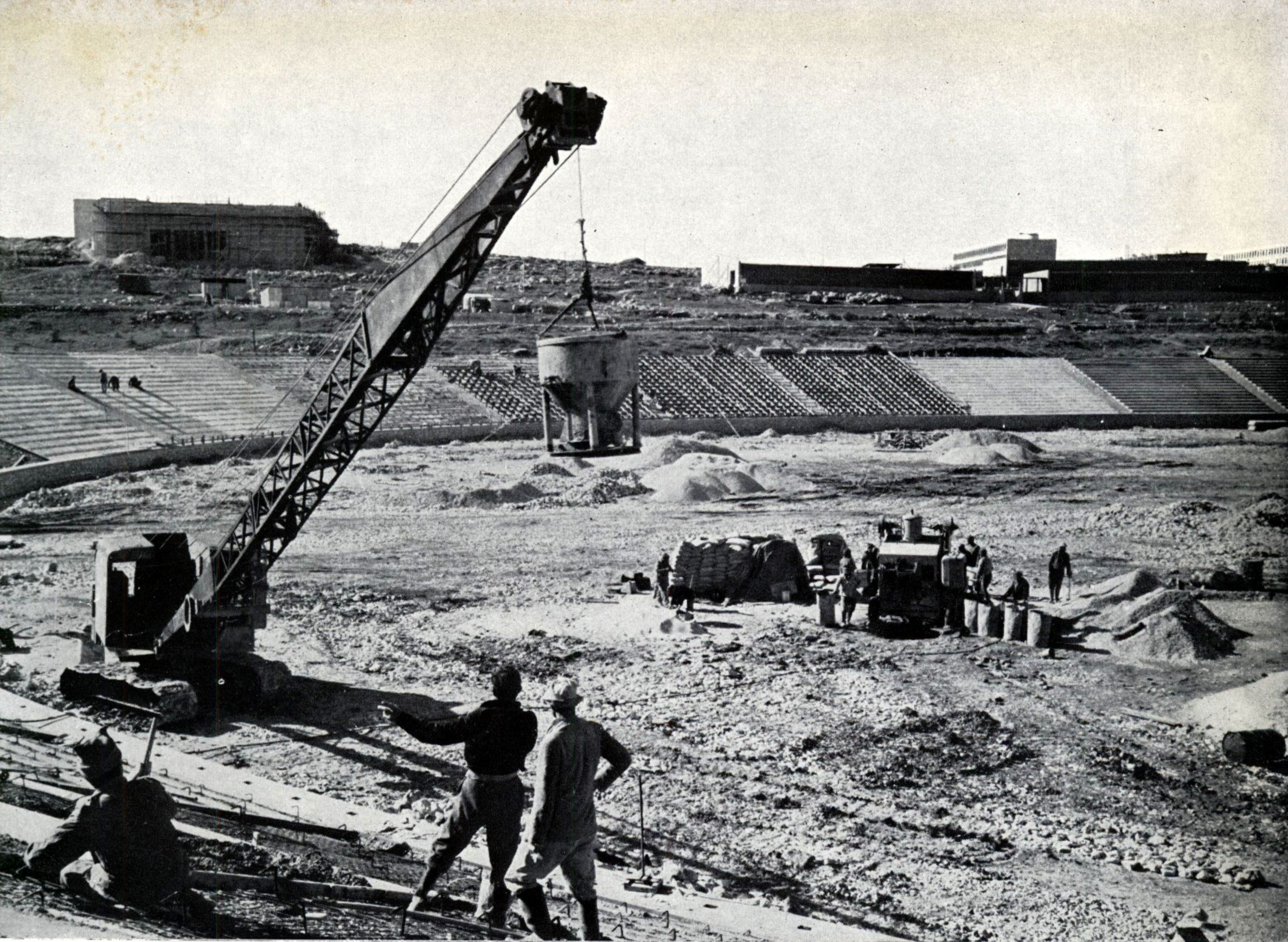 האצטדיון הלאומי והאוניברסיטאי. הוקם בשיתוף עם האוניברסיטה העברית לפי תכנון כללי של האדריכל קלרווין ותכנונה המפורט של מ.ע.צ. 16,600 מקומות ישיבה, אך ניתן להוסיף ספסלים על גבי הסוללה. מגרשי הספורט הושלמו ע"י האוניברסיטה במתכונת המקובלת באולימפיאדות. נחנך בחגיגות יום העשור במעמד 20,000 צופים.